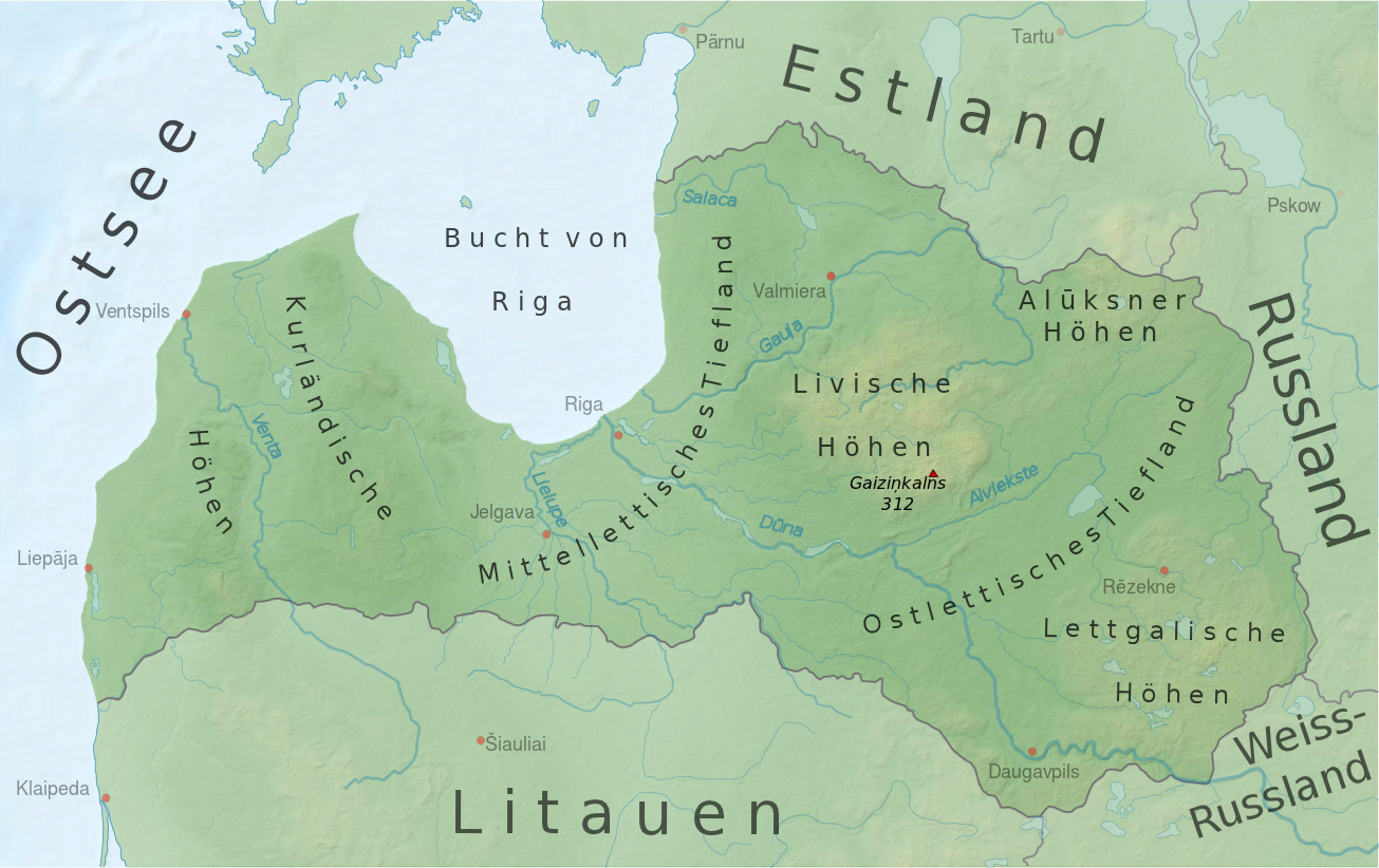 Physische Karte von Lettland